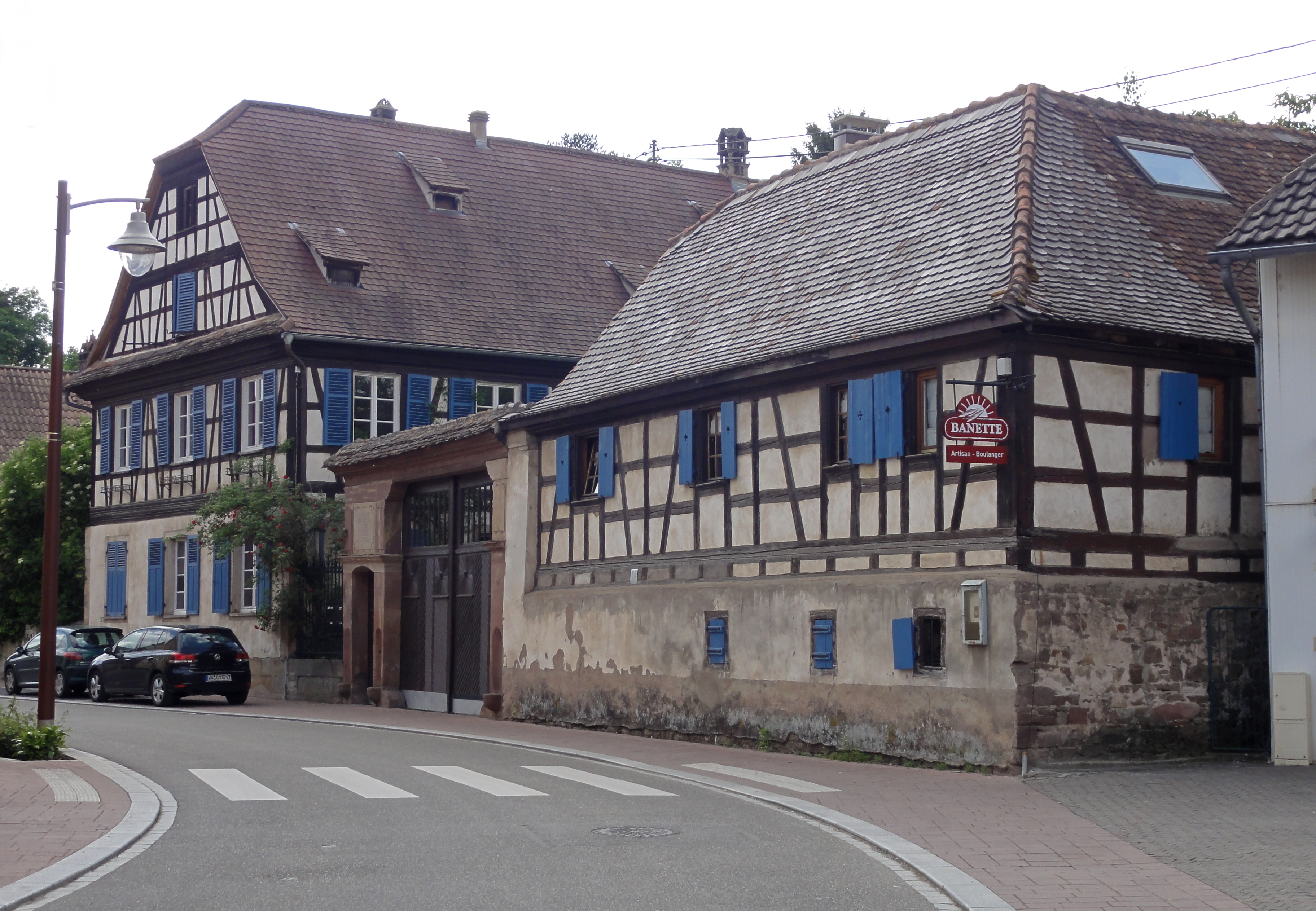 Alsace, Bas-Rhin, Hangenbieten, Ferme (1829), 9 rue de la Libération: .